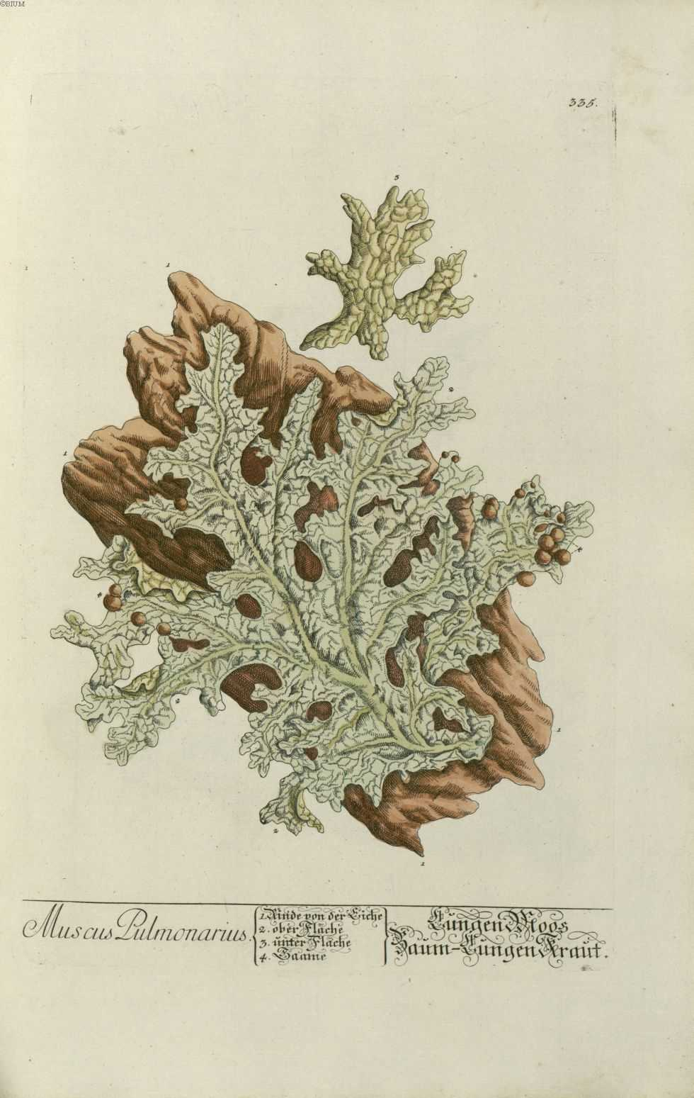 Gravures anciennes de plantes médicinales et pharmaceutiques tirées de "Herbarium Blackwellanium..." Elisabeth Blackwell - Nüremberg 1757